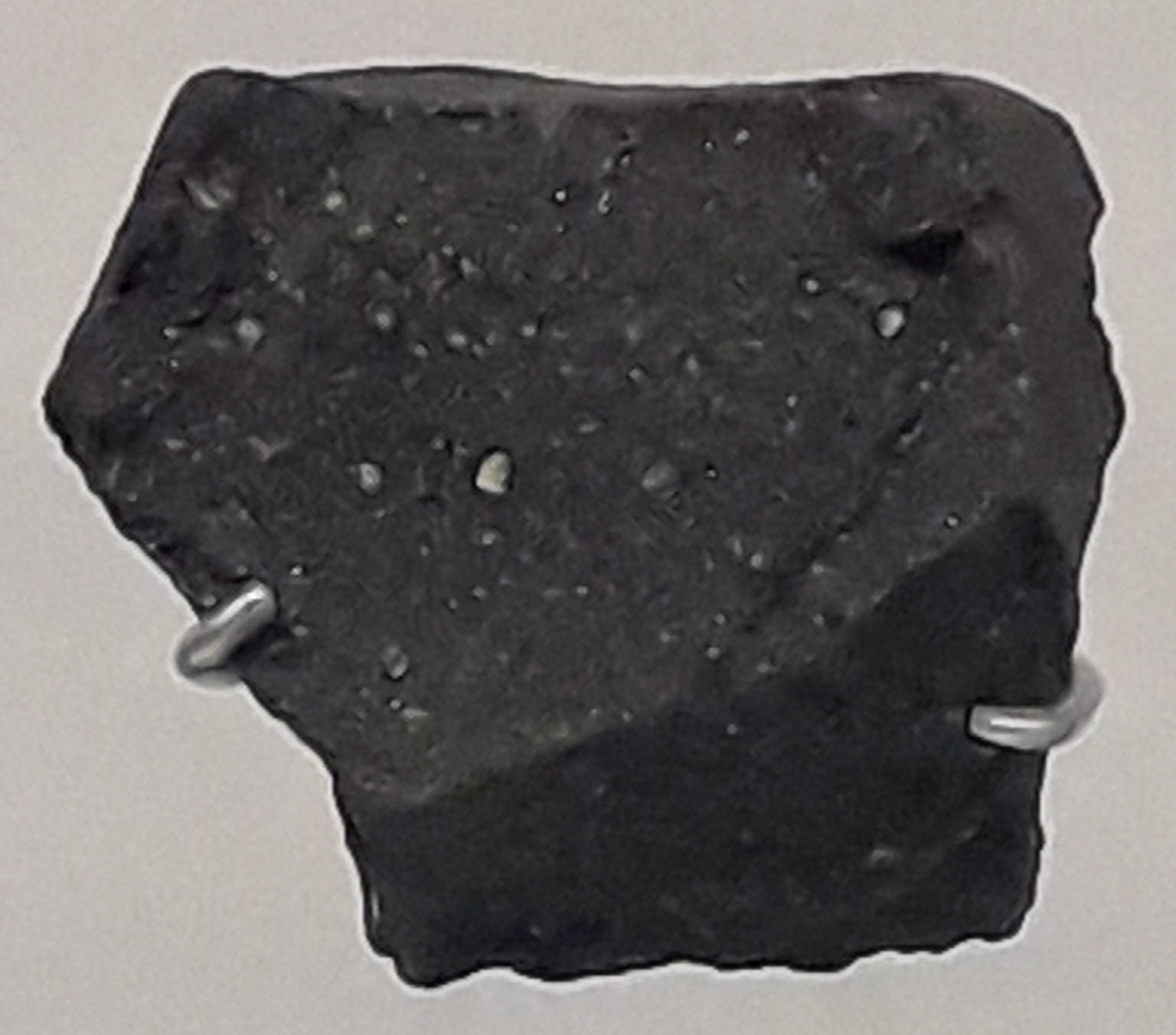 Fragment de la météorite Murchison, tombée en 1969 en Australie. Composition : chondrite carbonée (CM2). Muséum national d'histoire naturelle, Paris (France). Exposée à Paris à l'occasion de l'exposition "Météorites", dans le bâtiment de la grande galerie de l'évolution, au Muséum national d'histoire naturelle de Paris (18 octobre 2017 - 10 juin 2018).